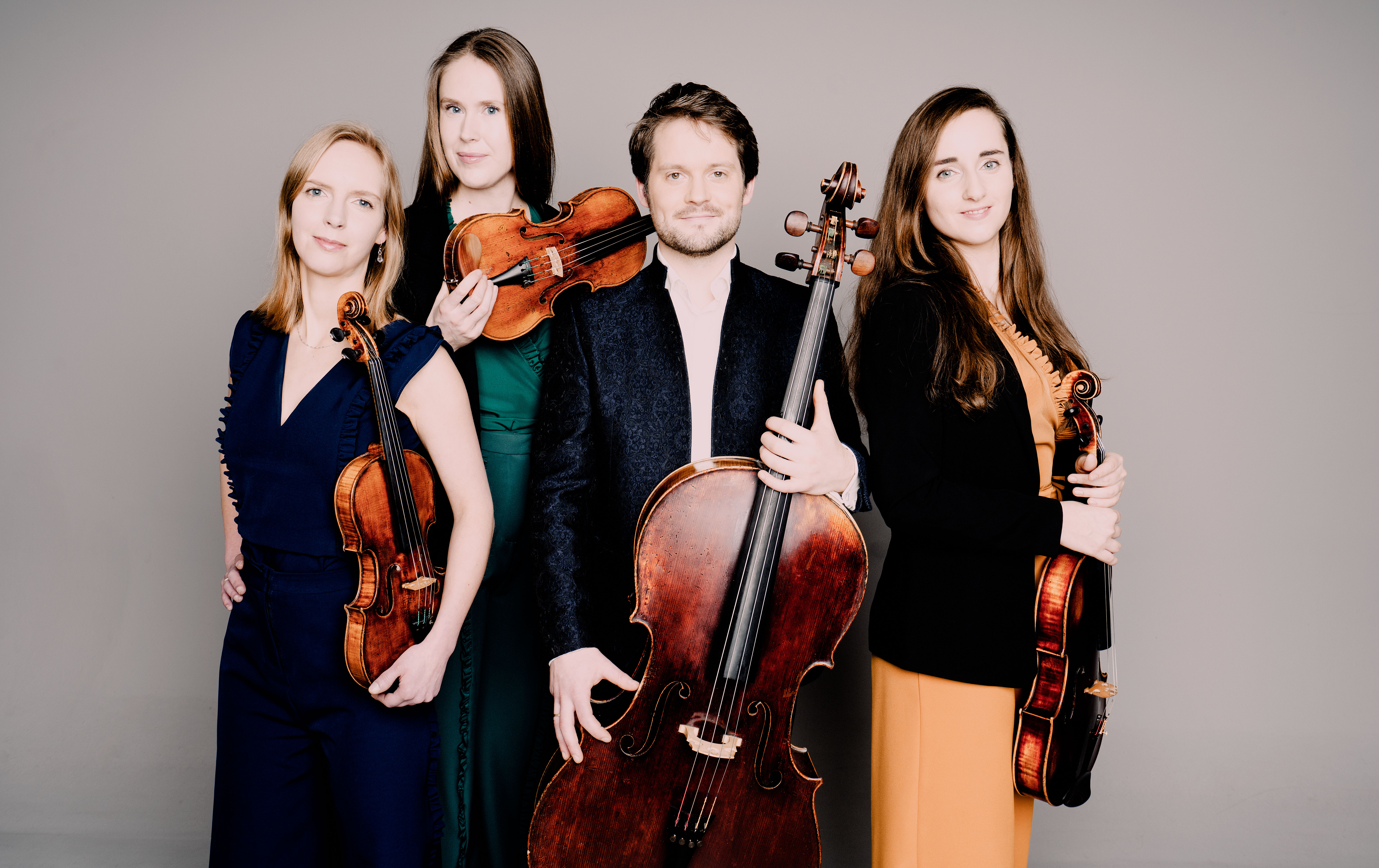 De huidige line-up van het Dudok Quartet Amsterdam: Judith van Driel, Marleen Wester, Marie-Louise de Jong en David Faber